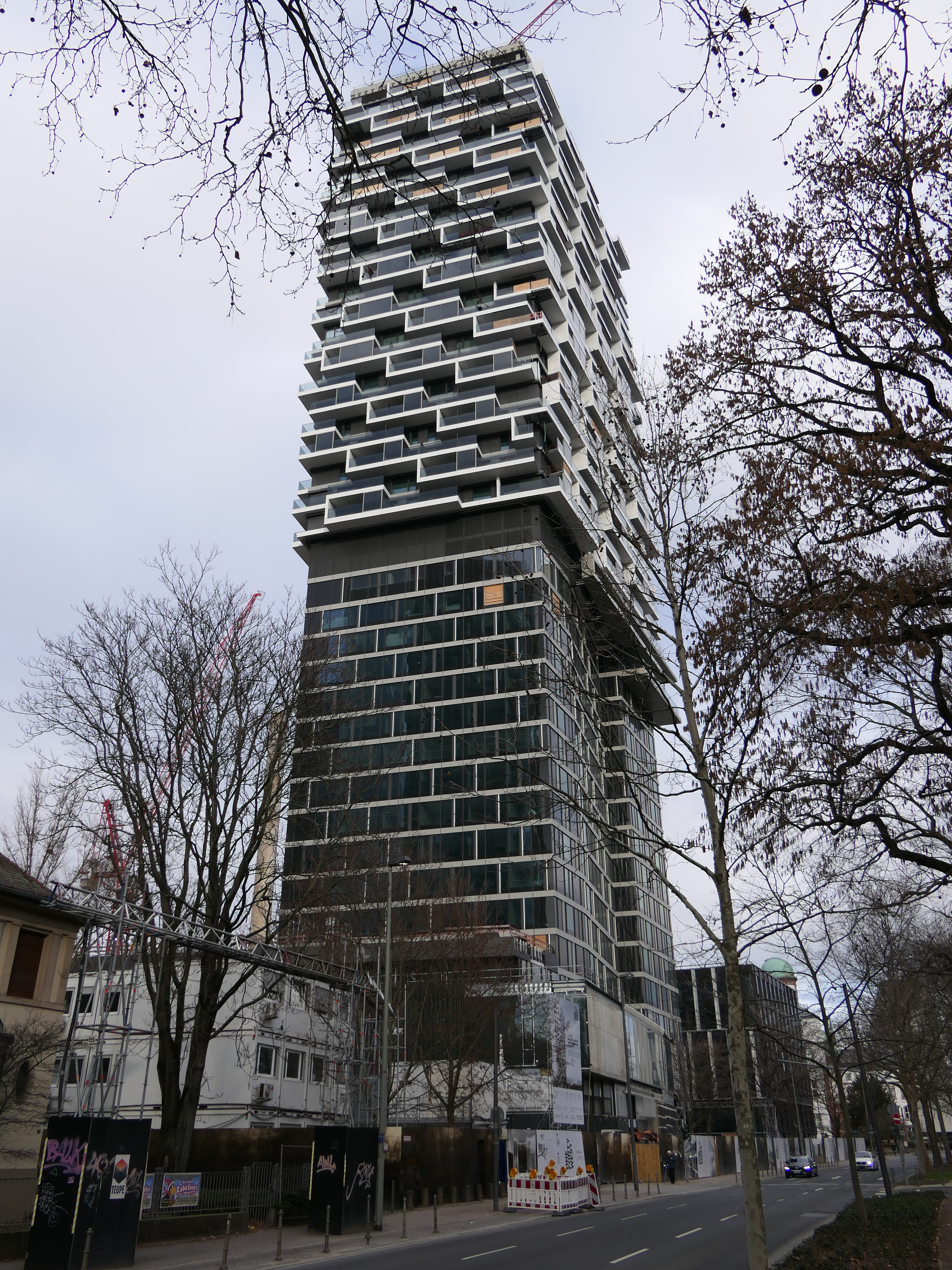 Baufortschritt am One Forty West in Frankfurt im Januar 2020.